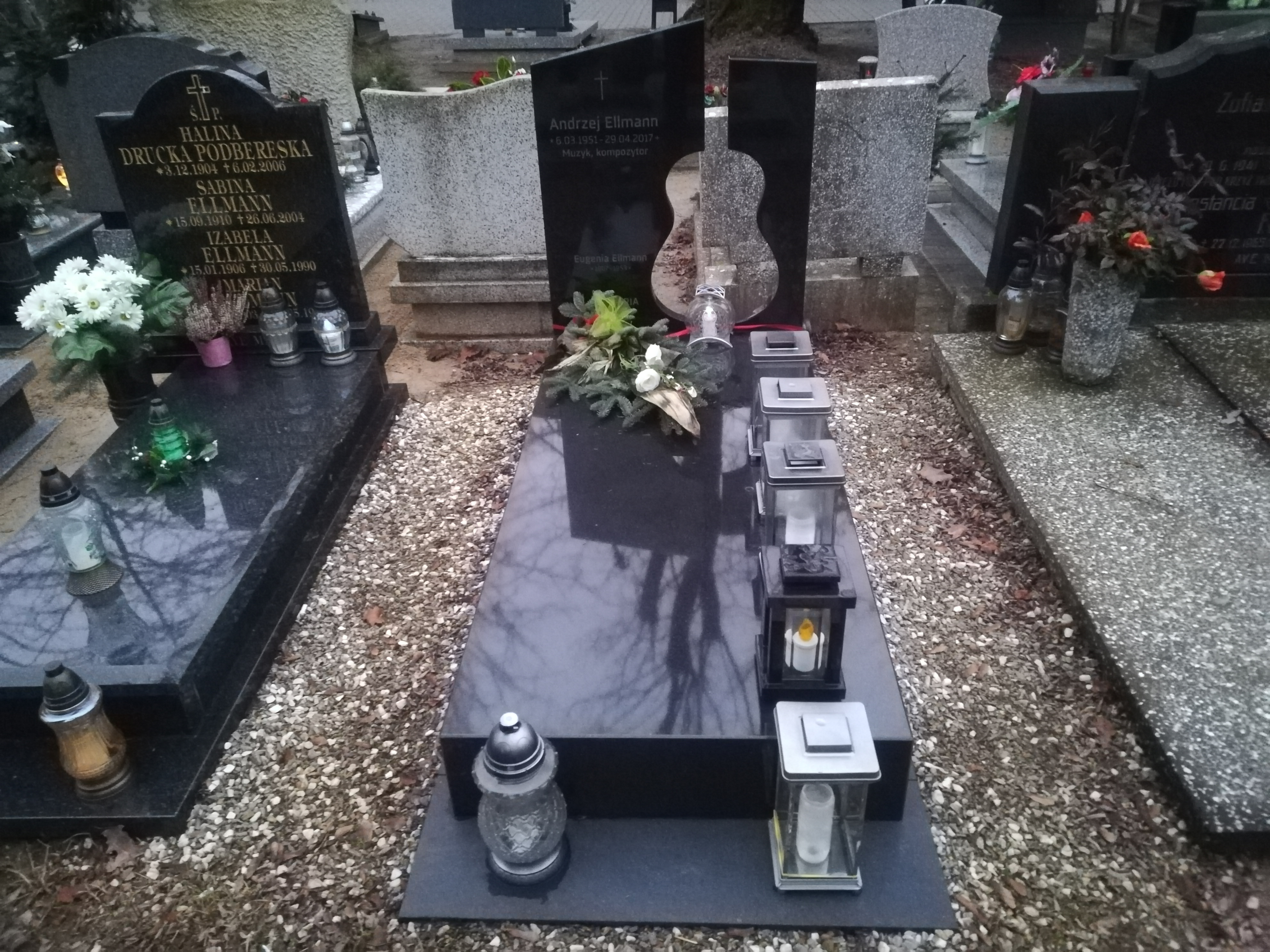 Grób Andrzeja Ellmanna na cmentarzu górczyńskim w Poznaniu.